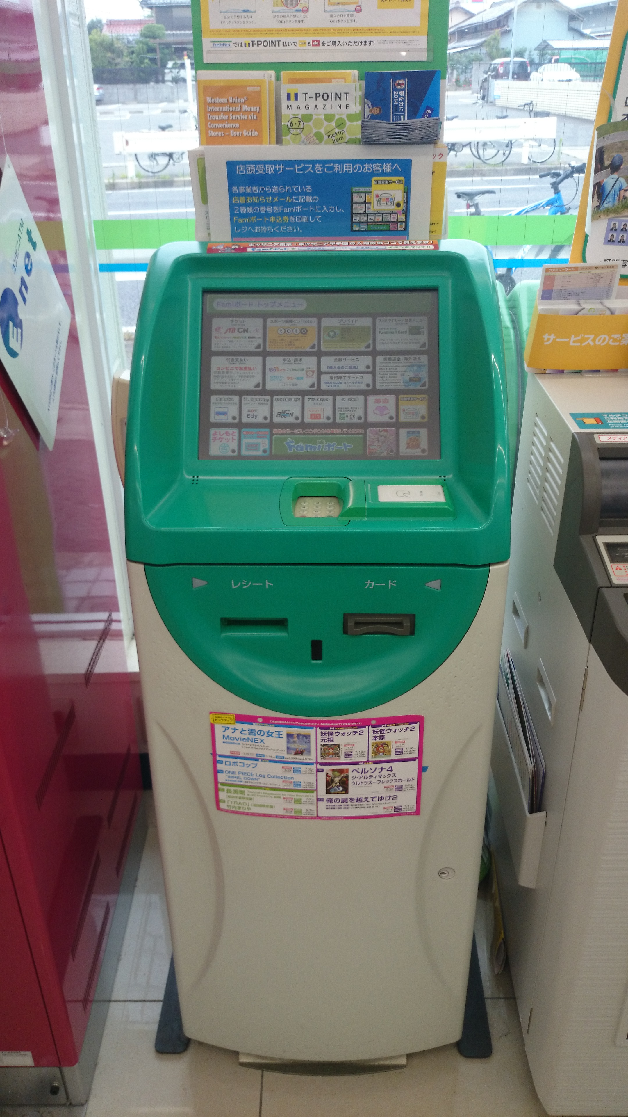 ファミポート設置例